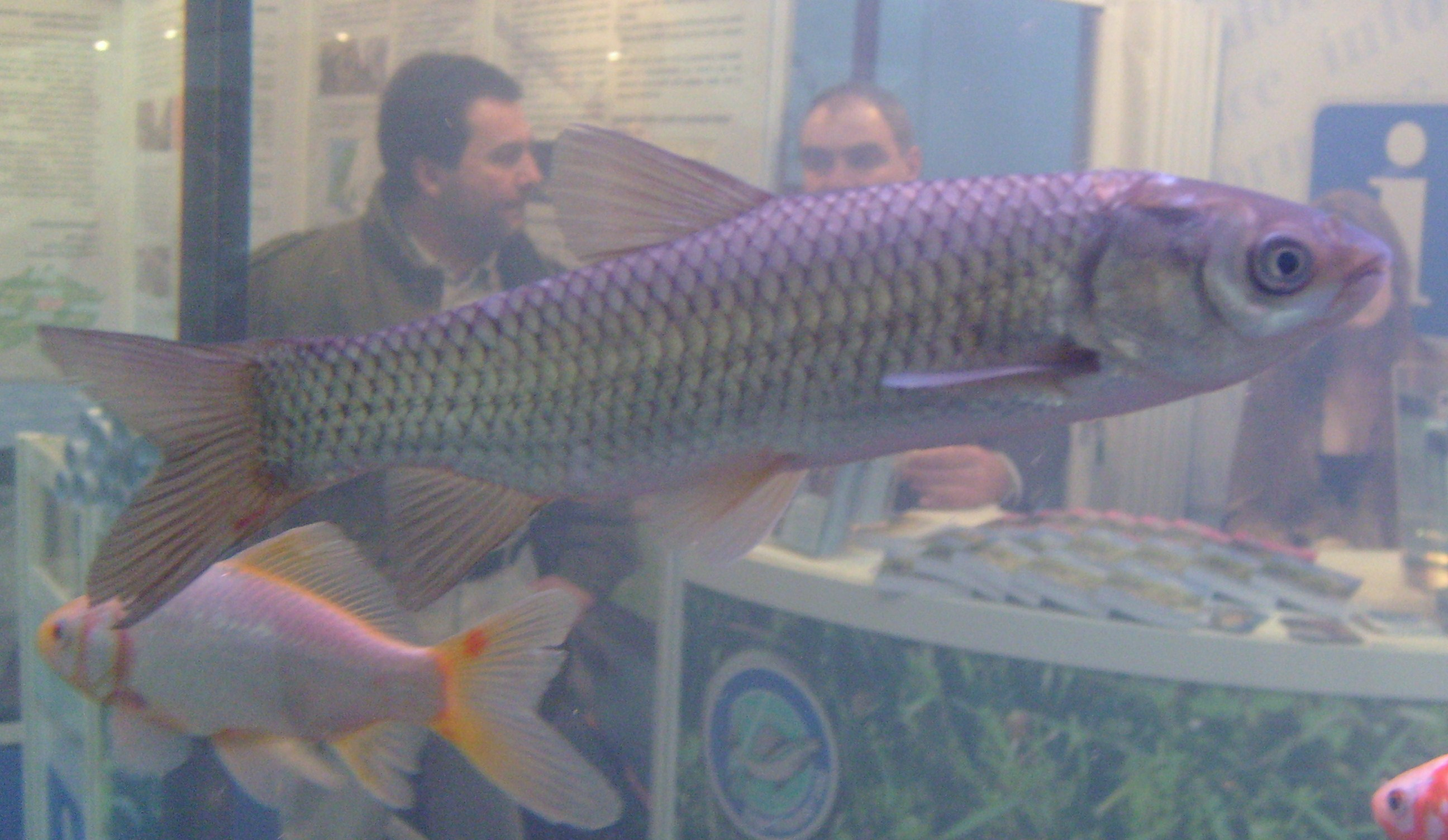 Amur bílý (Ctenopharyngodon idella) v akváriu na veletrhu Petrův zdar.